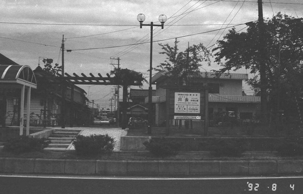 川去駅跡